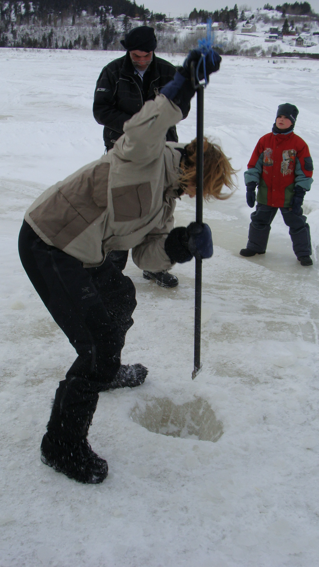 Homme creusant un trou à l'aide d'une barre métallique affutée lors du Festival de la pêche blanche à Saint-Fulgence, au Québec (Canada).